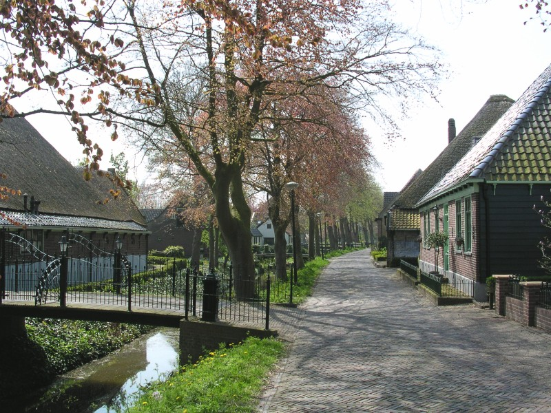 Typerend straatbeeld van Opperdoes A typical view of Opperdoes